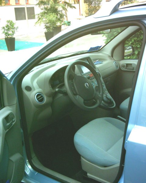 Prototipo Fiat Panda Hydrogen del 2006 fotografato all'Expo "AlternativaMente" di Medole nel 2007